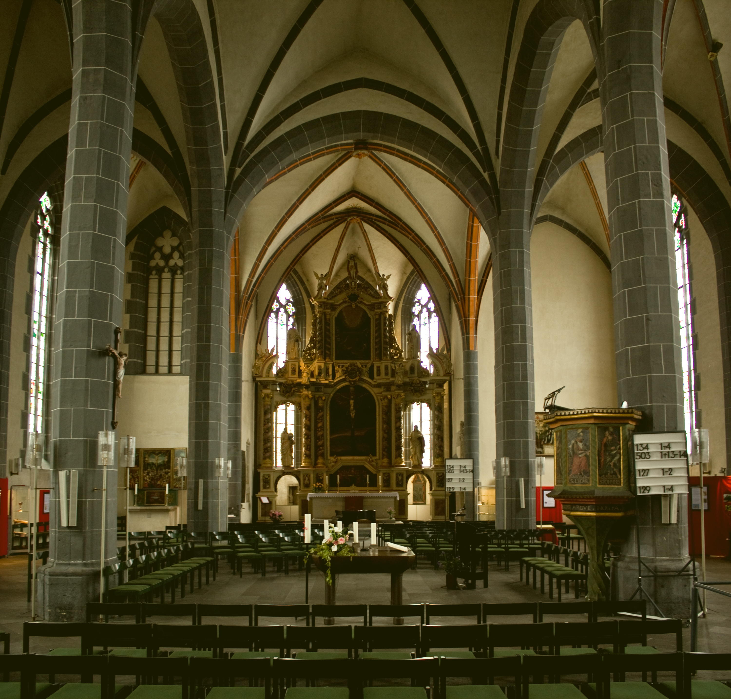 Hann. Münden, Blasiuskirche